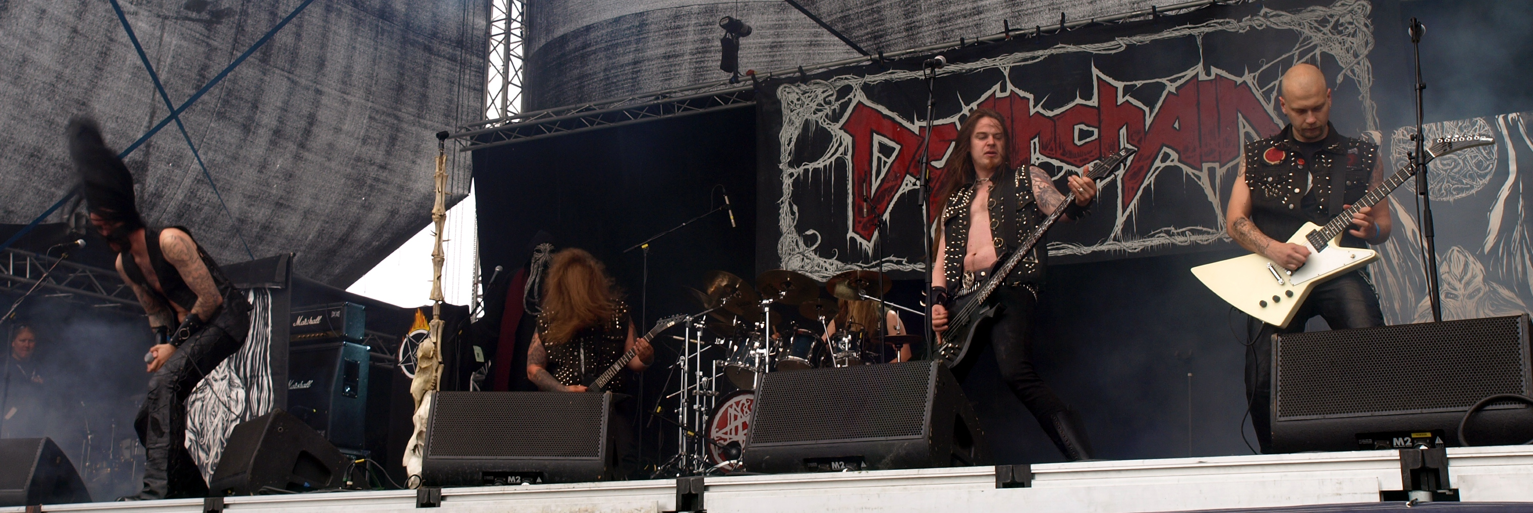 Deathchain live am Myötätuulirock 2011